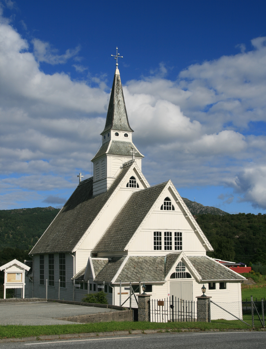 Skjoldastraumen kyrkje